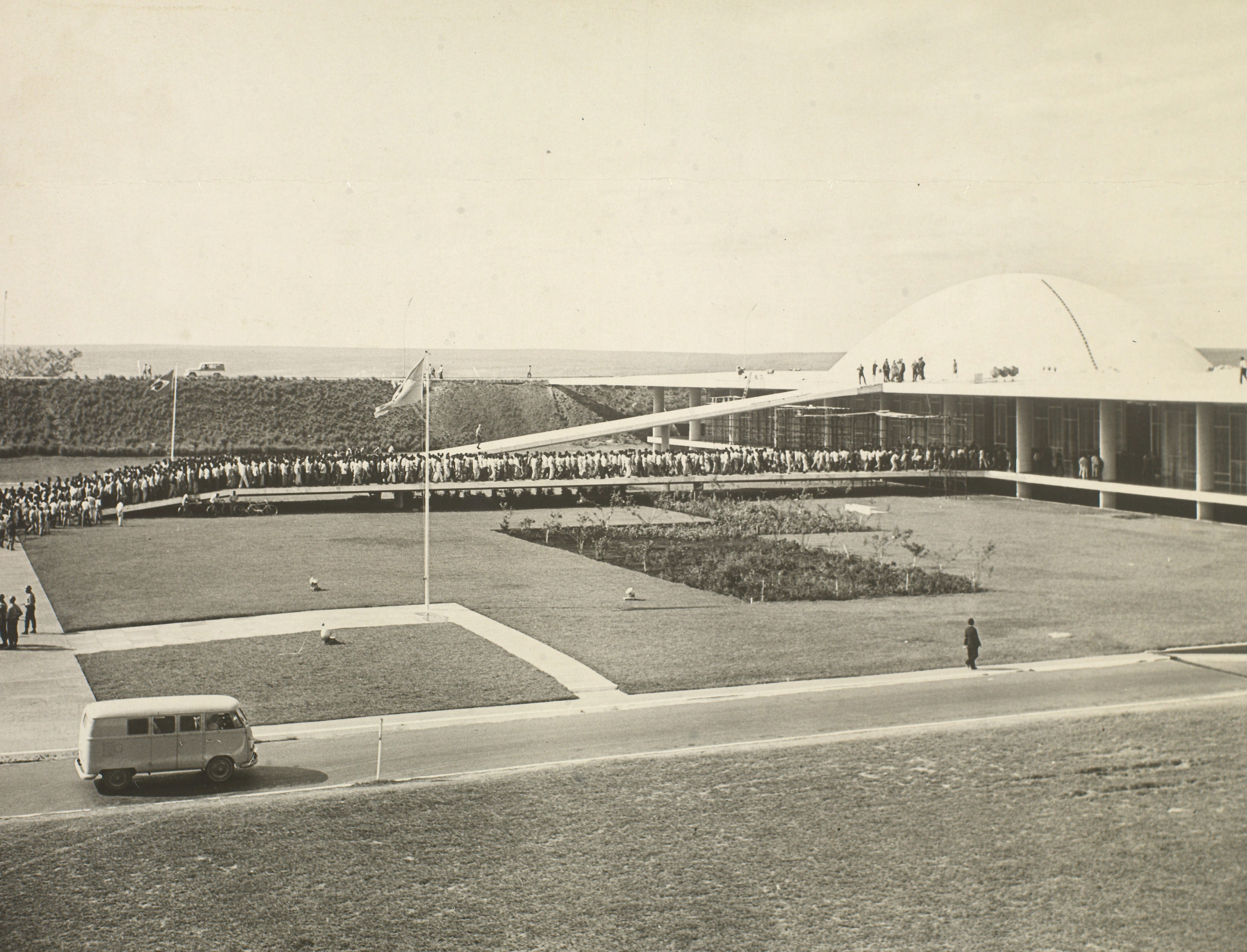 Fotografia do Fundo Correio da Manhã, sob a guarda do Arquivo Nacional.